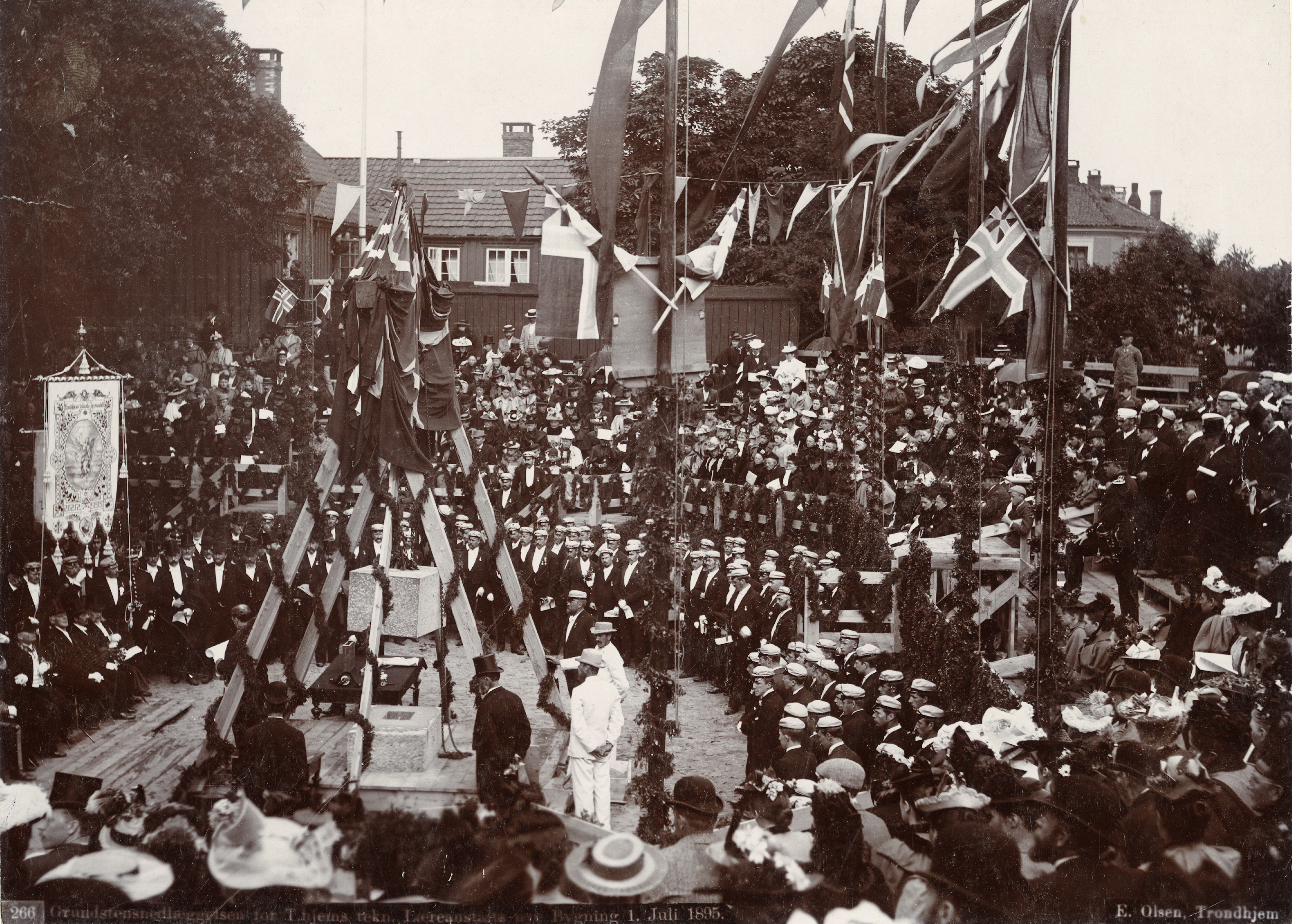 Munkegaten 1 i Trondheim, Sør-Trøndelag Grunnstensnedleggelse for Trondheim tekniske læreranstalts nye bygning. 1. juli 1895. Ombygd til rådhus ca. 1930.